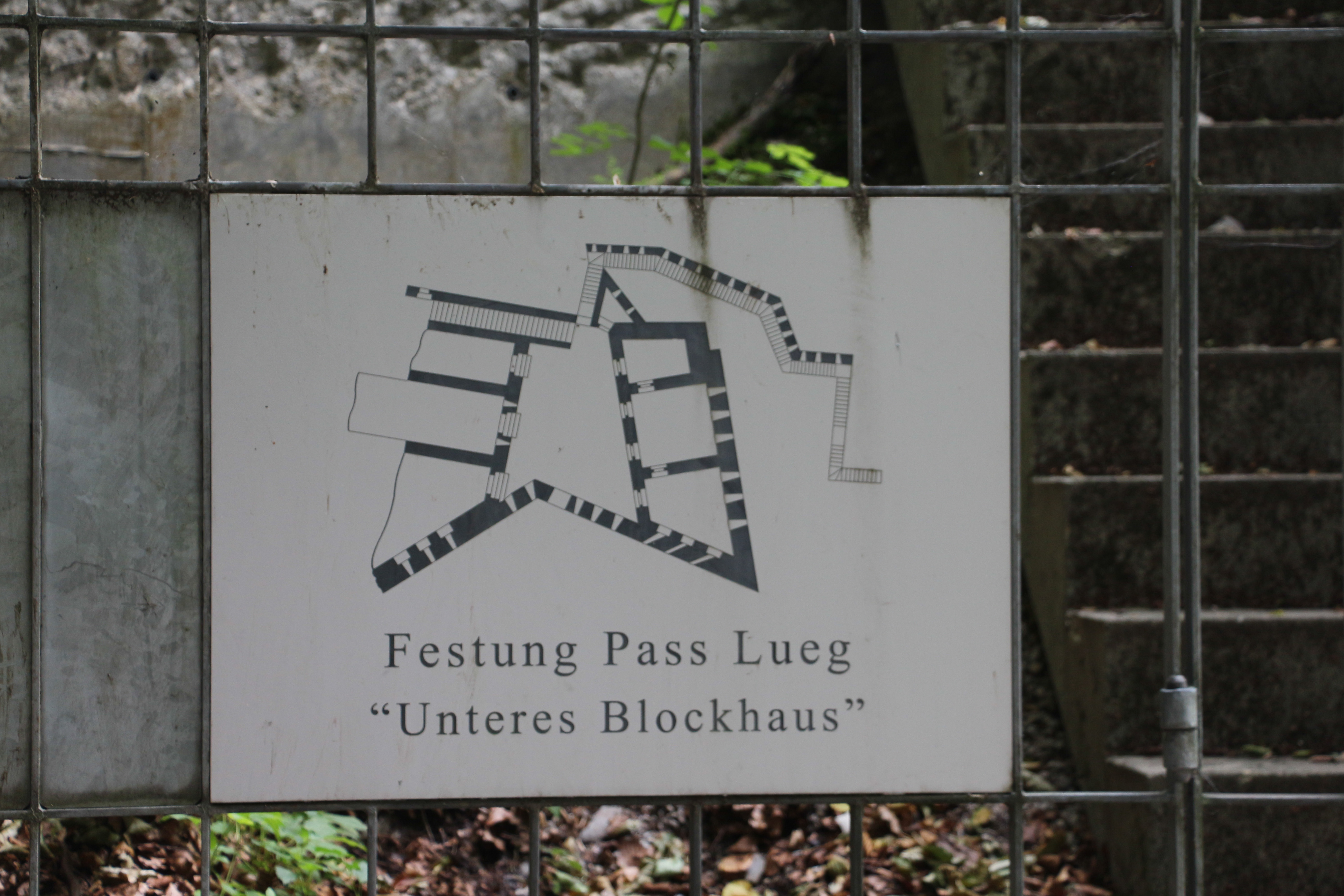 Passanlage und -befestigung, Pass Lueg Golling im Salzachtal